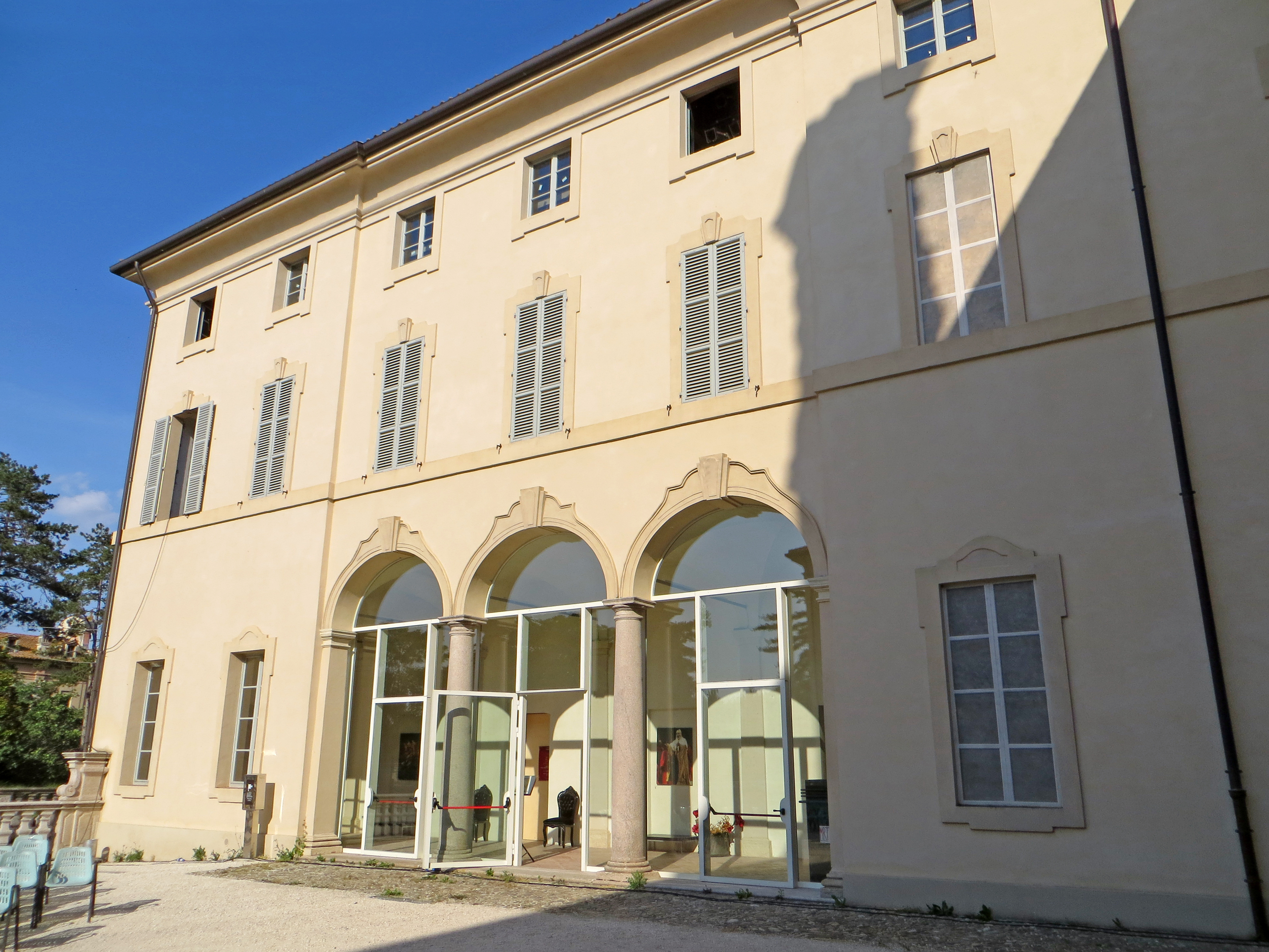 Villa Pallavicino (Busseto) - ala est del Palazzo delle Scuderie This is a photo of a monument which is part of cultural heritage of Italy.